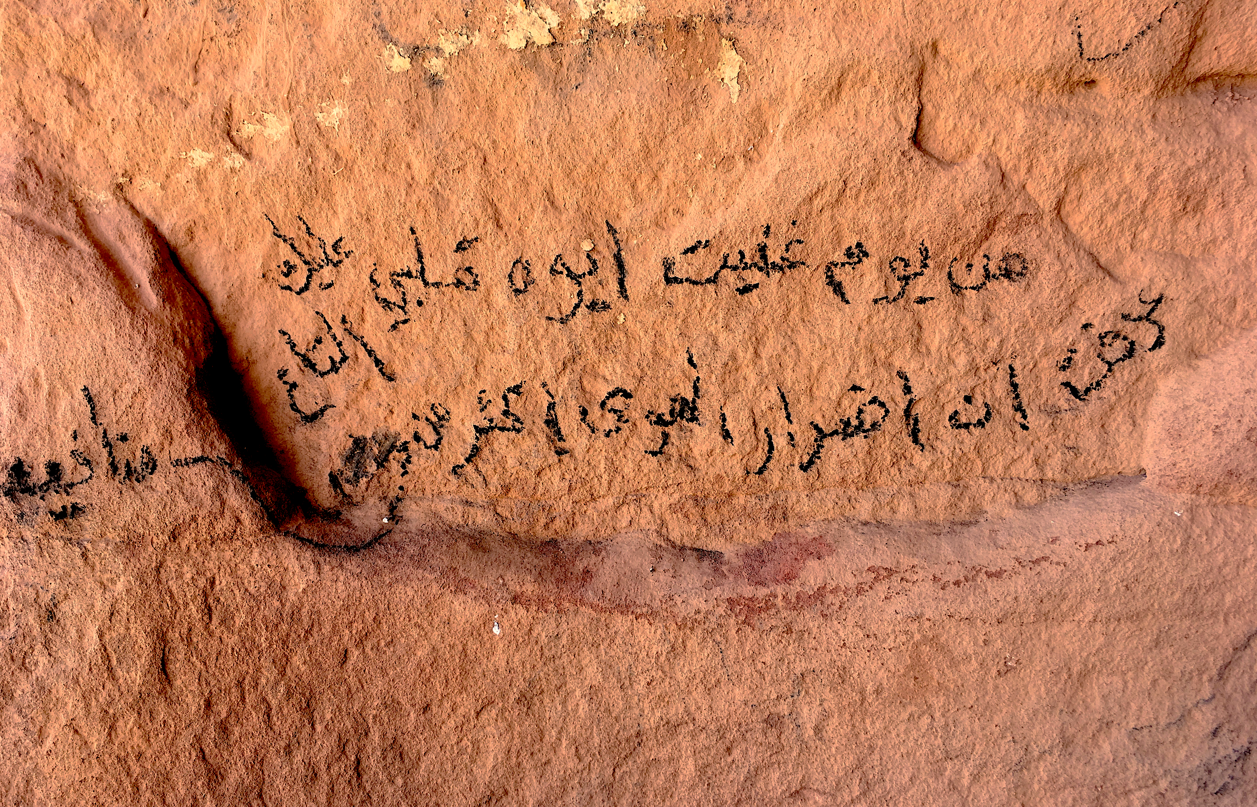 Arabic graffiti in a cave in Jordan